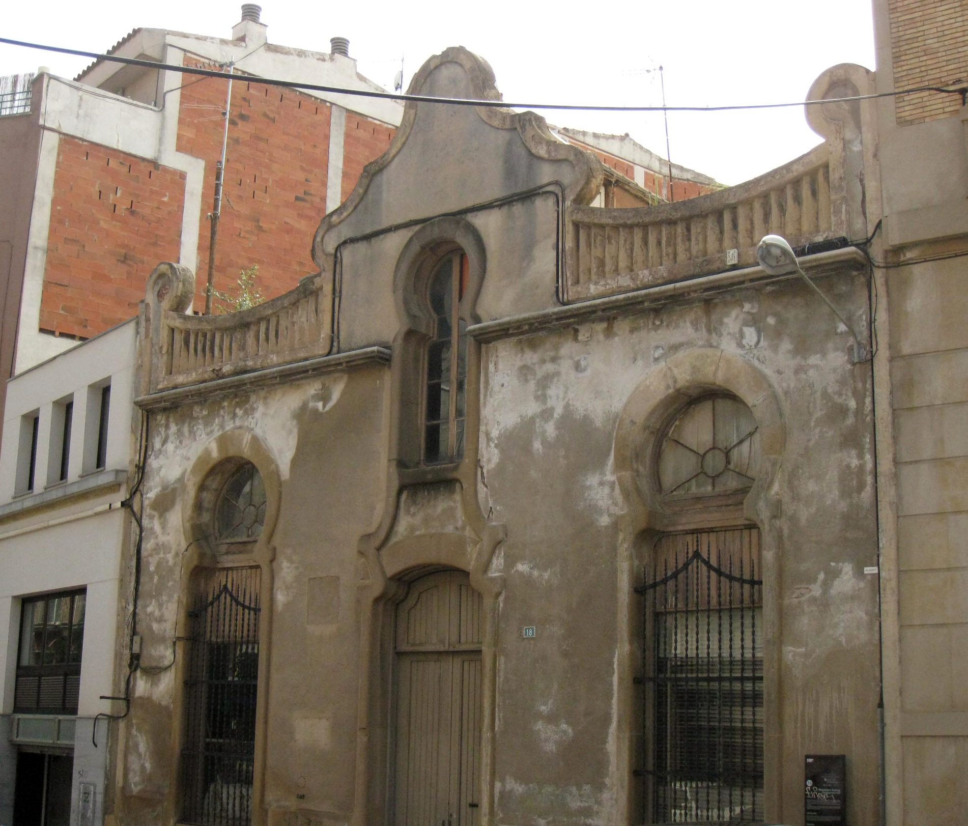 Magatzem Corcoy, a la plaça de Mossèn Jacint Verdaguer, núm. 16 (Terrassa). És un edifici modernista de Melcior Viñals, de començament del segle XX.